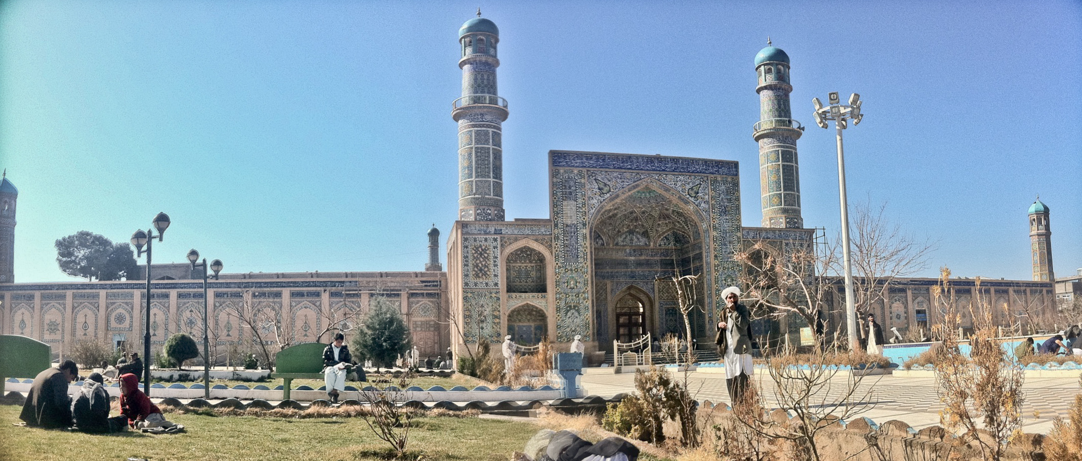 Friday Mosque Panoramas